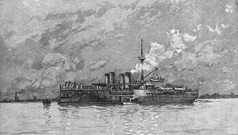 Taranarak dijital ortama aktarılmıştır.